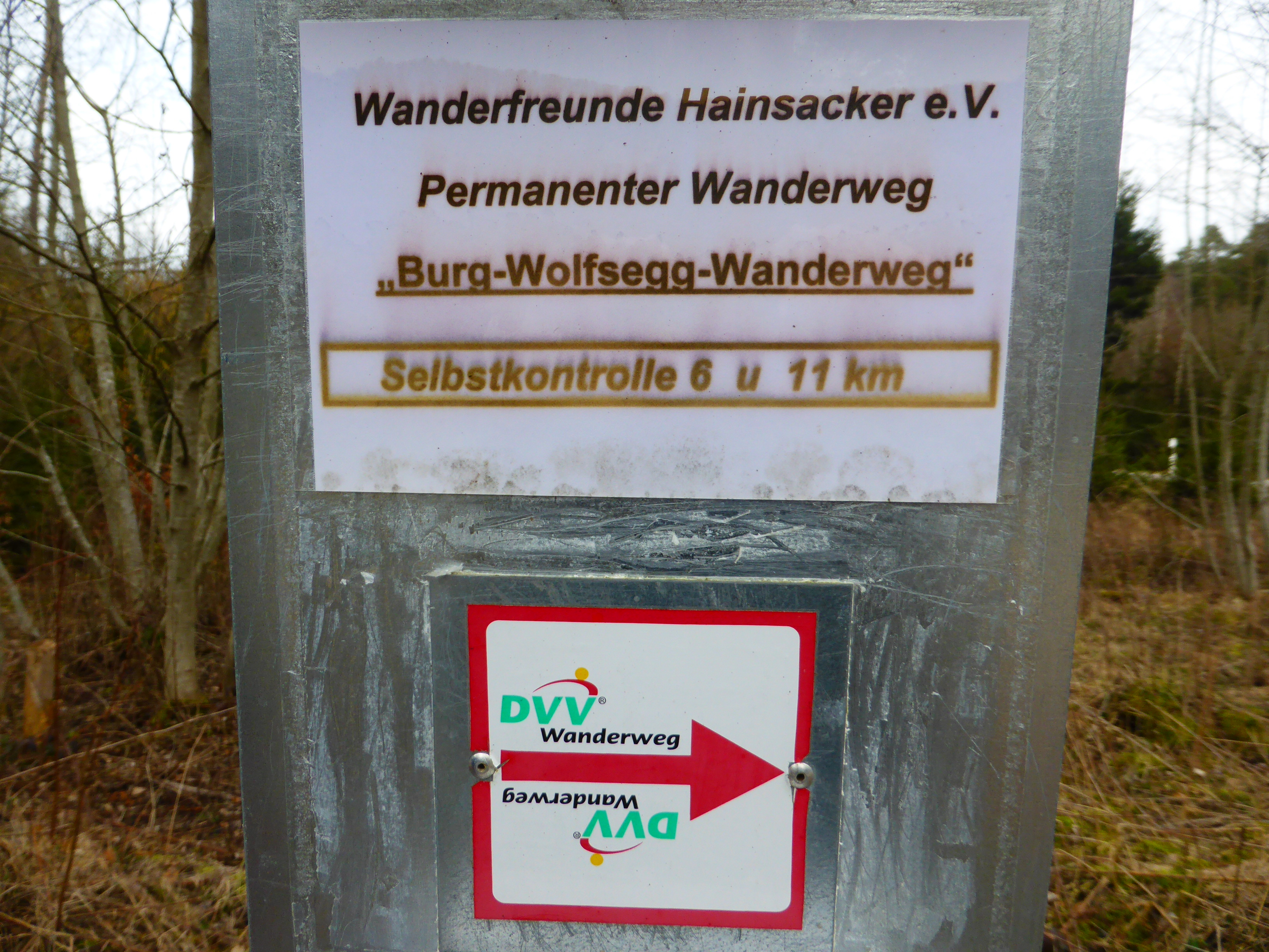 Permanenter Wanderweg "Burg Wolfsegg Wanderweg"